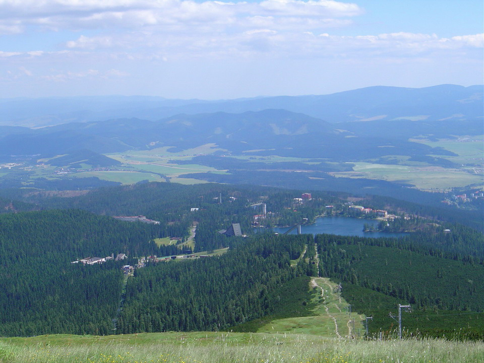 Strbske Pleso from Chata pod Soliskom